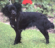 Markiesje